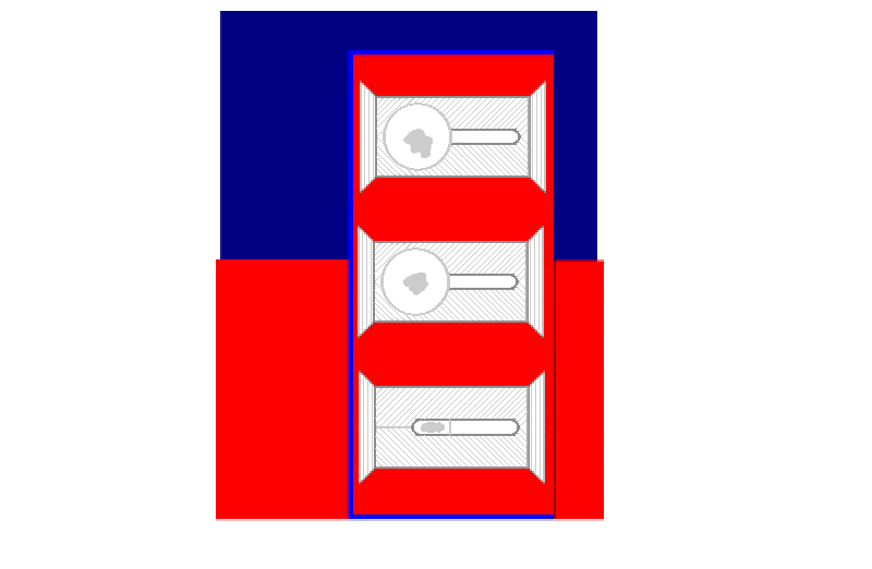 Brandenburgische Aufschläge Offiziersuniform LIR 115